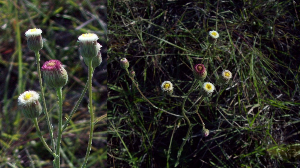 Conyza monorchis. Asteraceae. Fotos tomadas al margen del Lago de Palmar en pradera graminosa, departamento de Soriano, Uruguay.